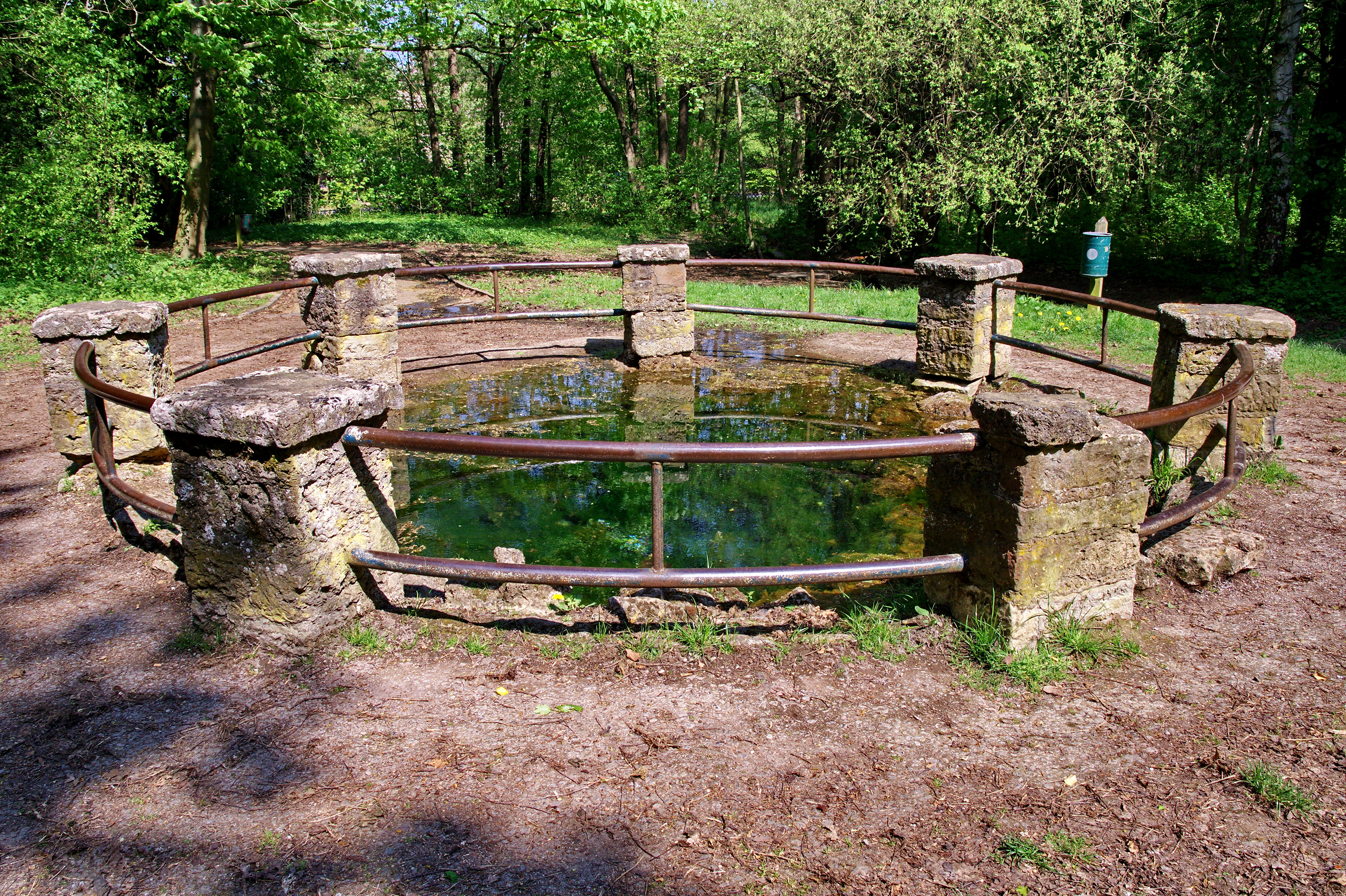 Krater am Galgenbrink in Bad Nenndorf am Deister, Niedersachsen, Deutschland